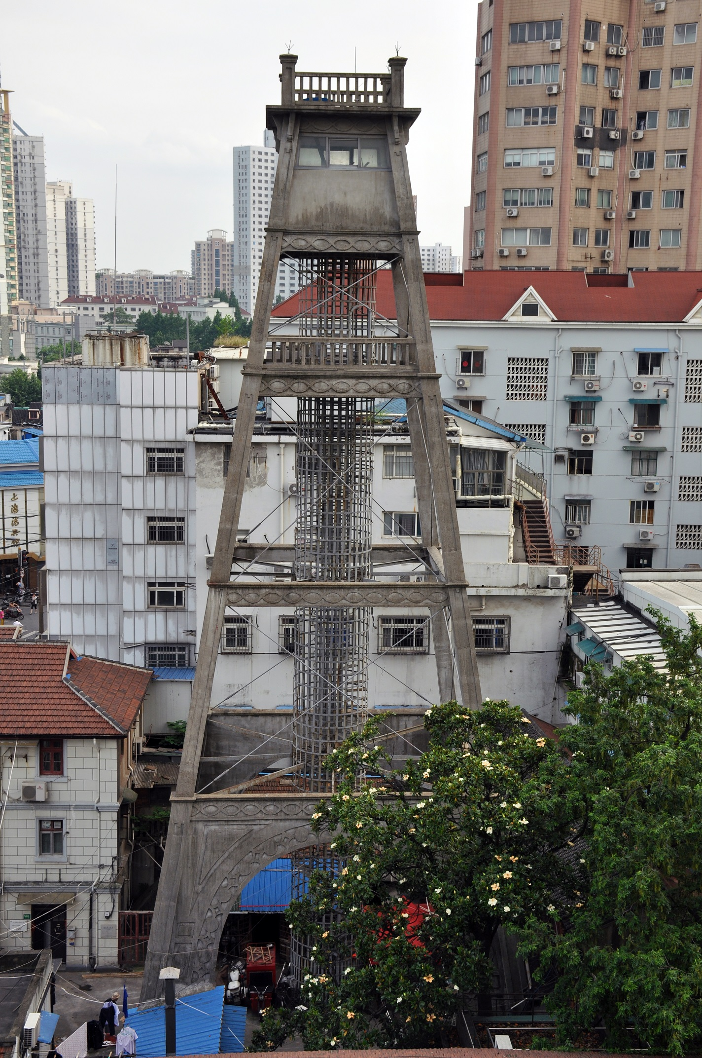 中文（中国大陆）: 小南门警钟楼 中华路581号 1909年